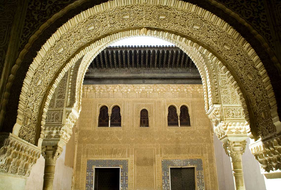 Esta Bonita Fotografía De La Alhambra De Granada